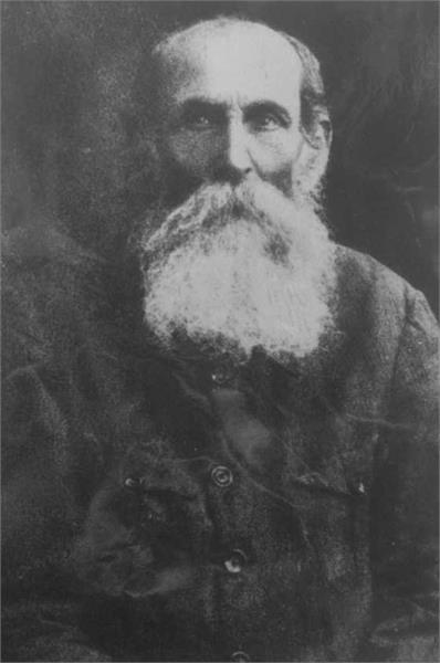 אהרן דוד גורדון